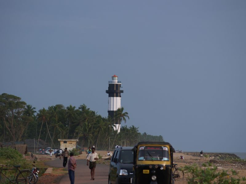 LightHouse Ponnani Kerala